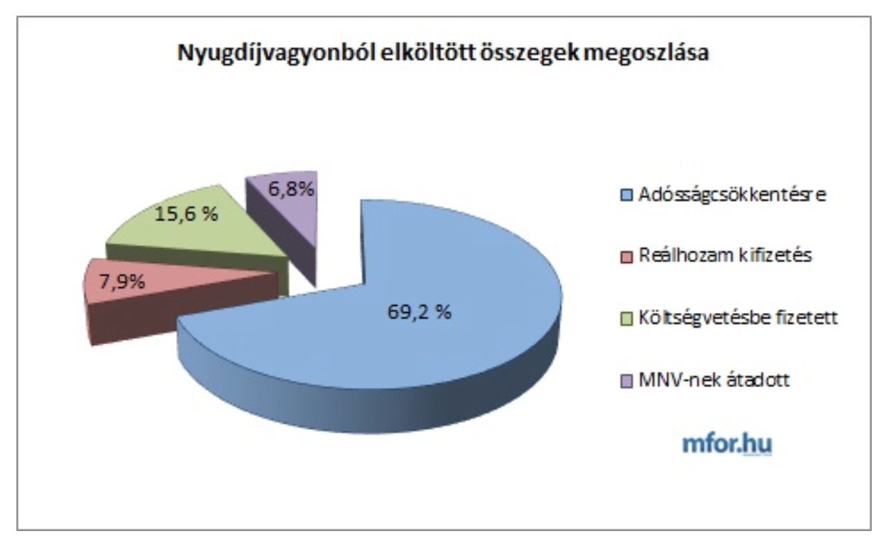 Adossagcsokkentes